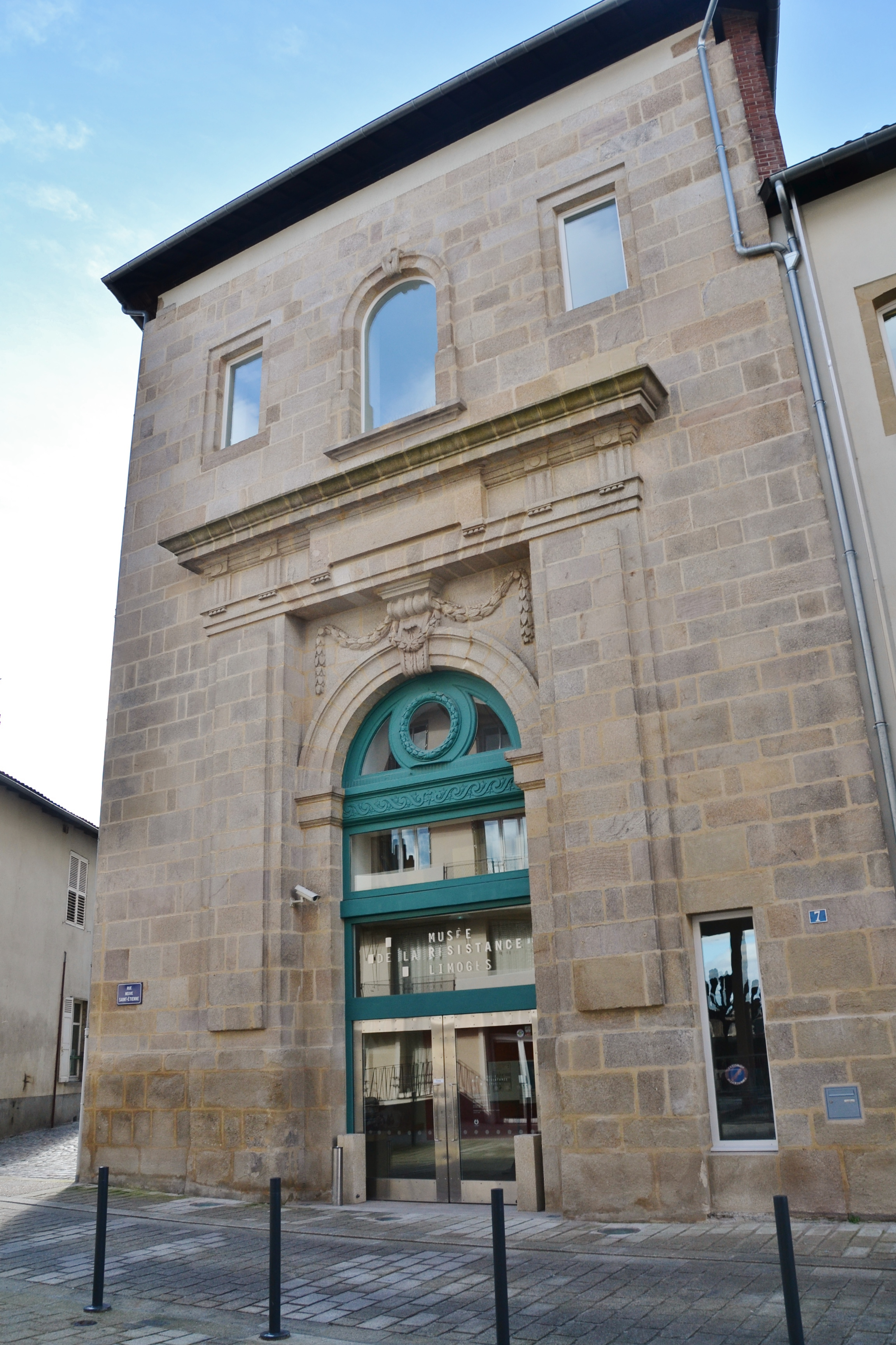 Entrée du musée de la Résistance de Limoges (Haute-Vienne, France)